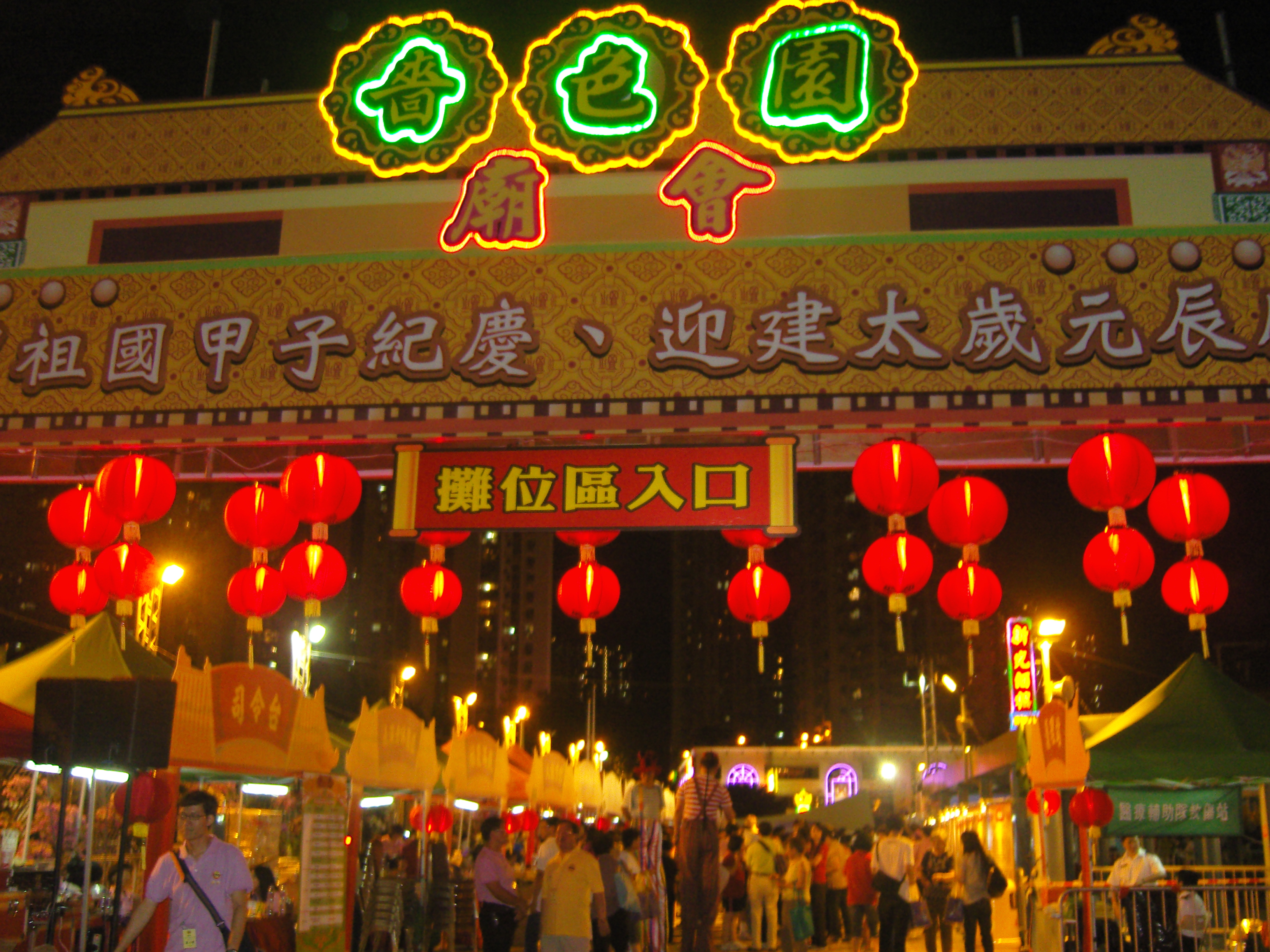 中式廟會